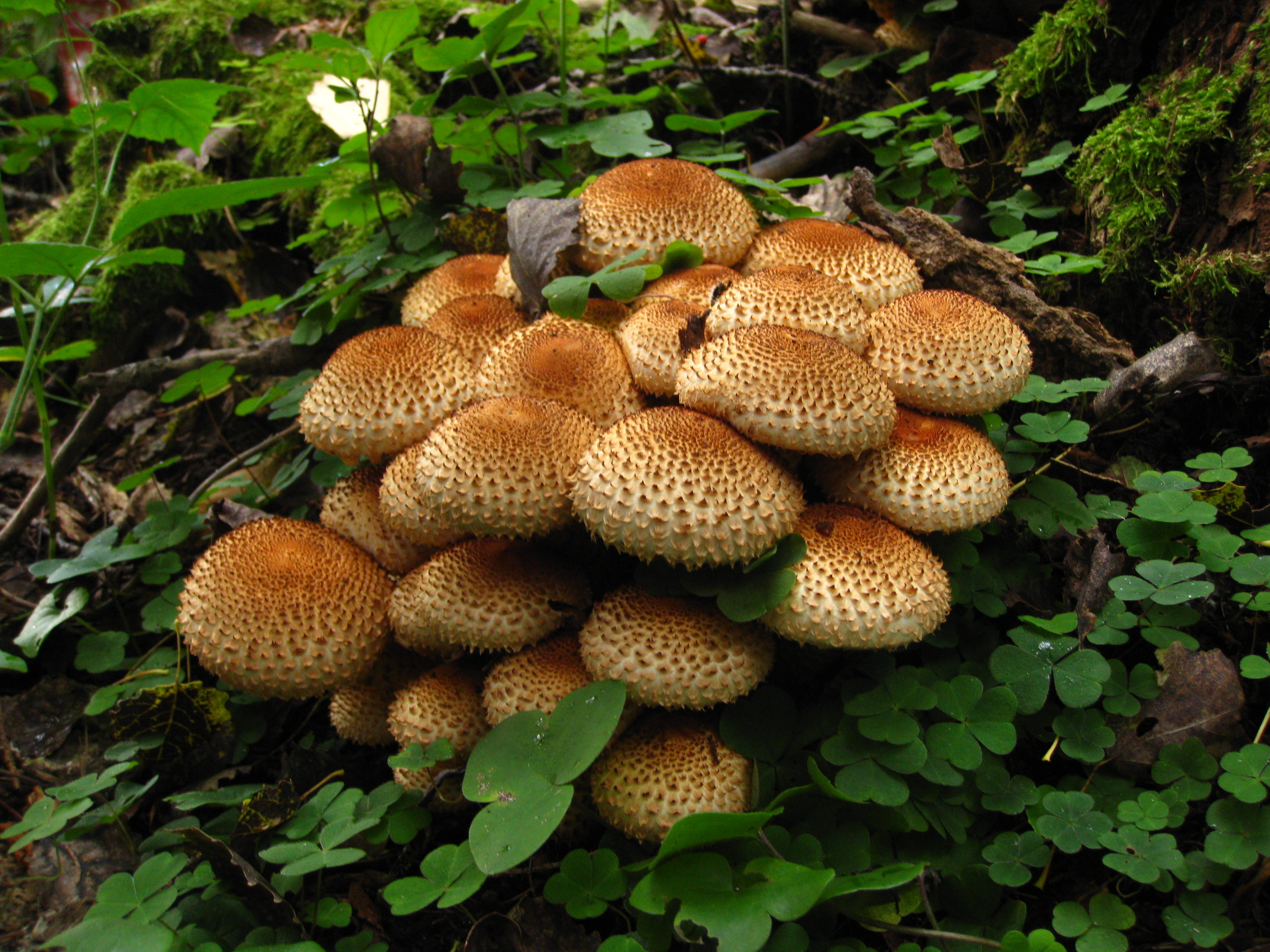 Soomusmampel (Pholiota squarrosa)